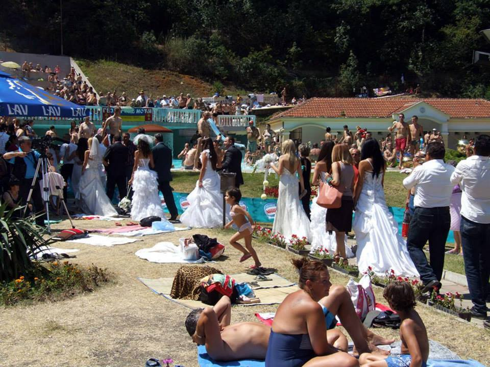 Српски (ћирилица): Гејзерске ноћи